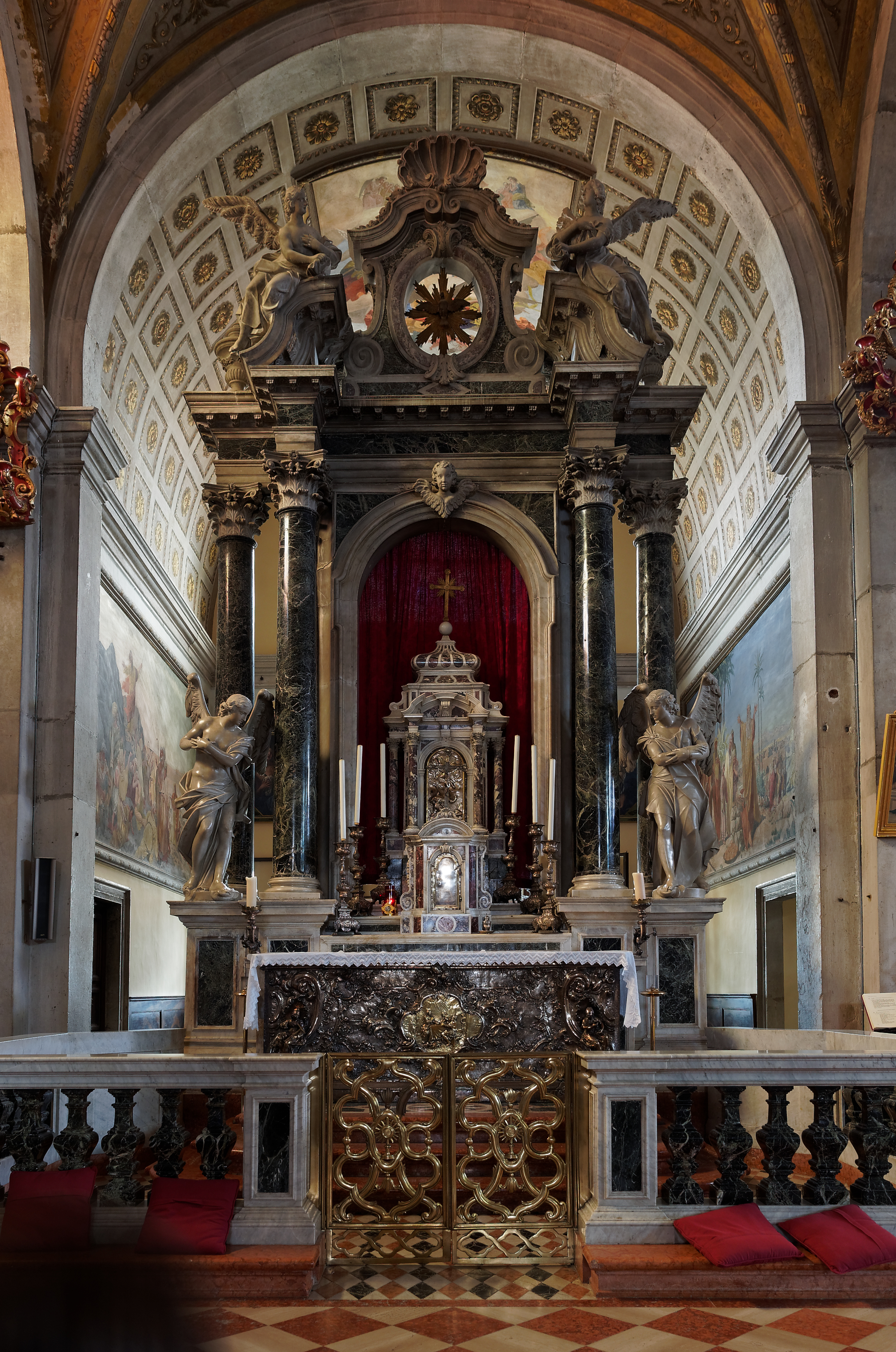 Nördlicher Seitenaltar in der Kirche St. Euphemia in Rovinj, Kroatien.